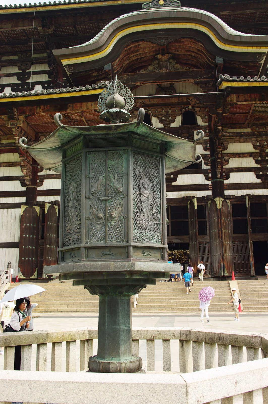 Achteckige Laterne im Todaiji